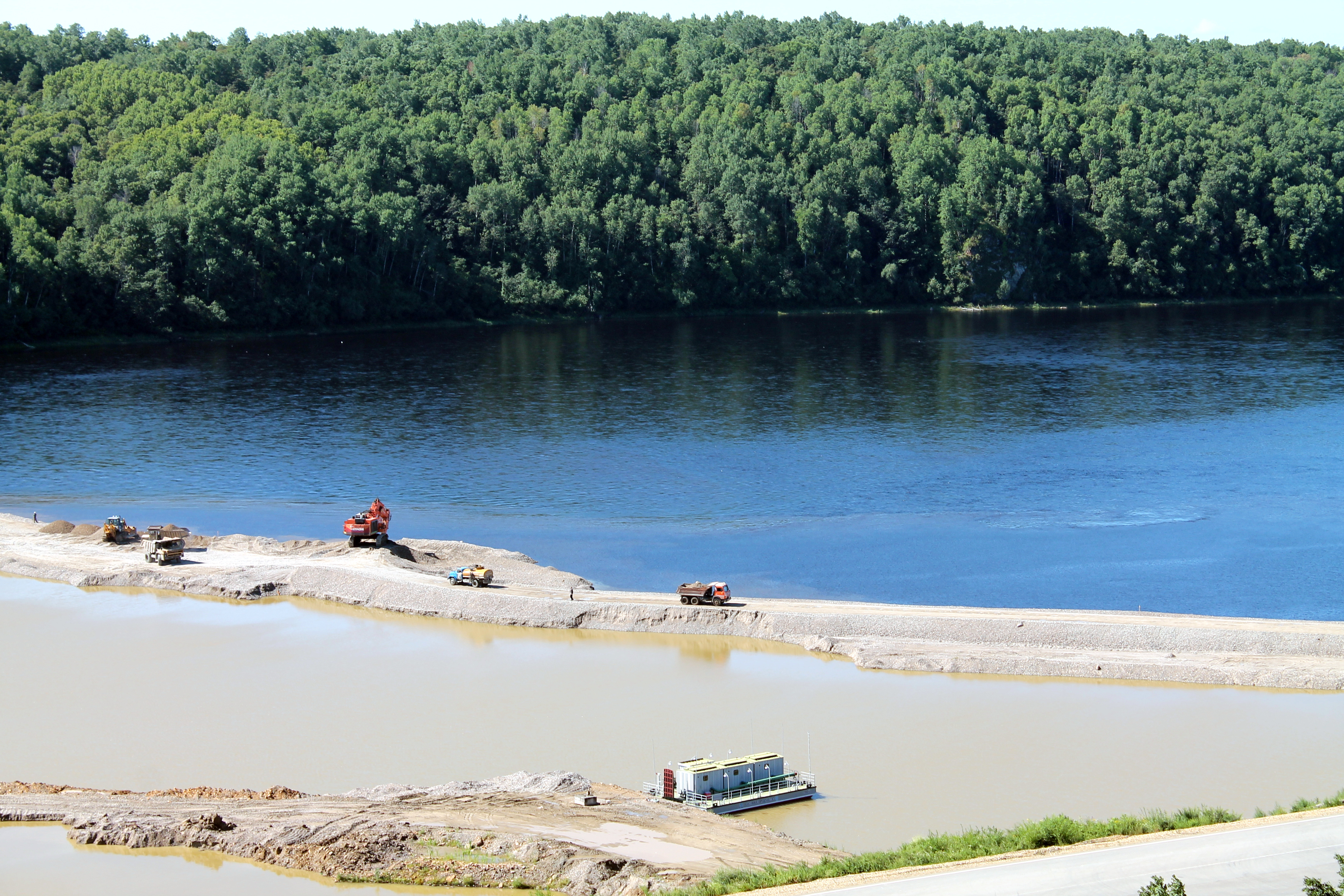 Перемычки Нижне-Бурейской ГЭС